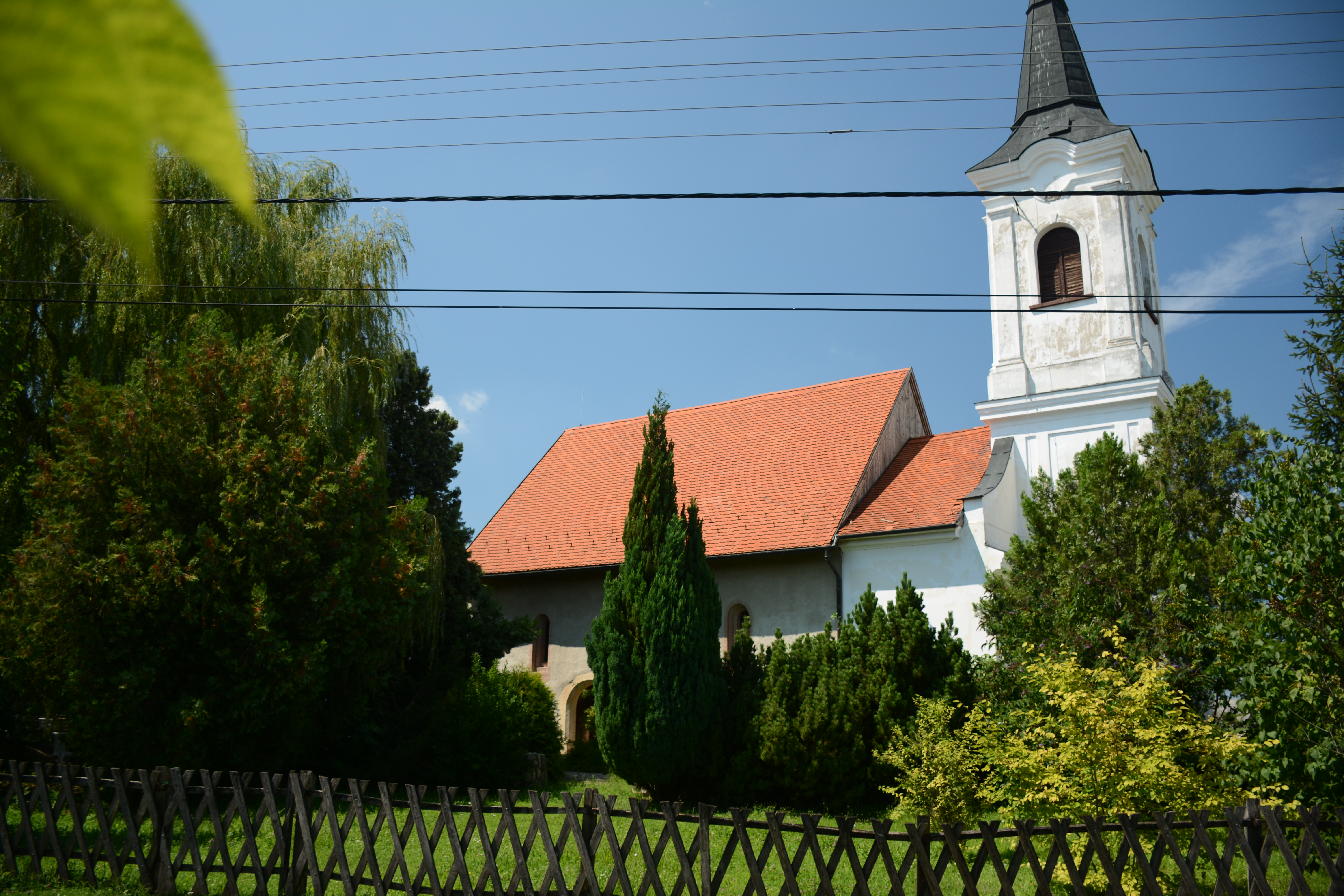 templom